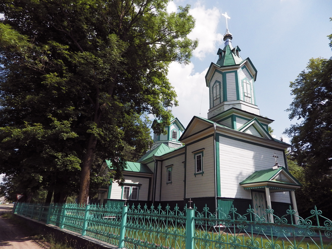 Василівська церква, с. Бовсуни, вул. Центральна, 85